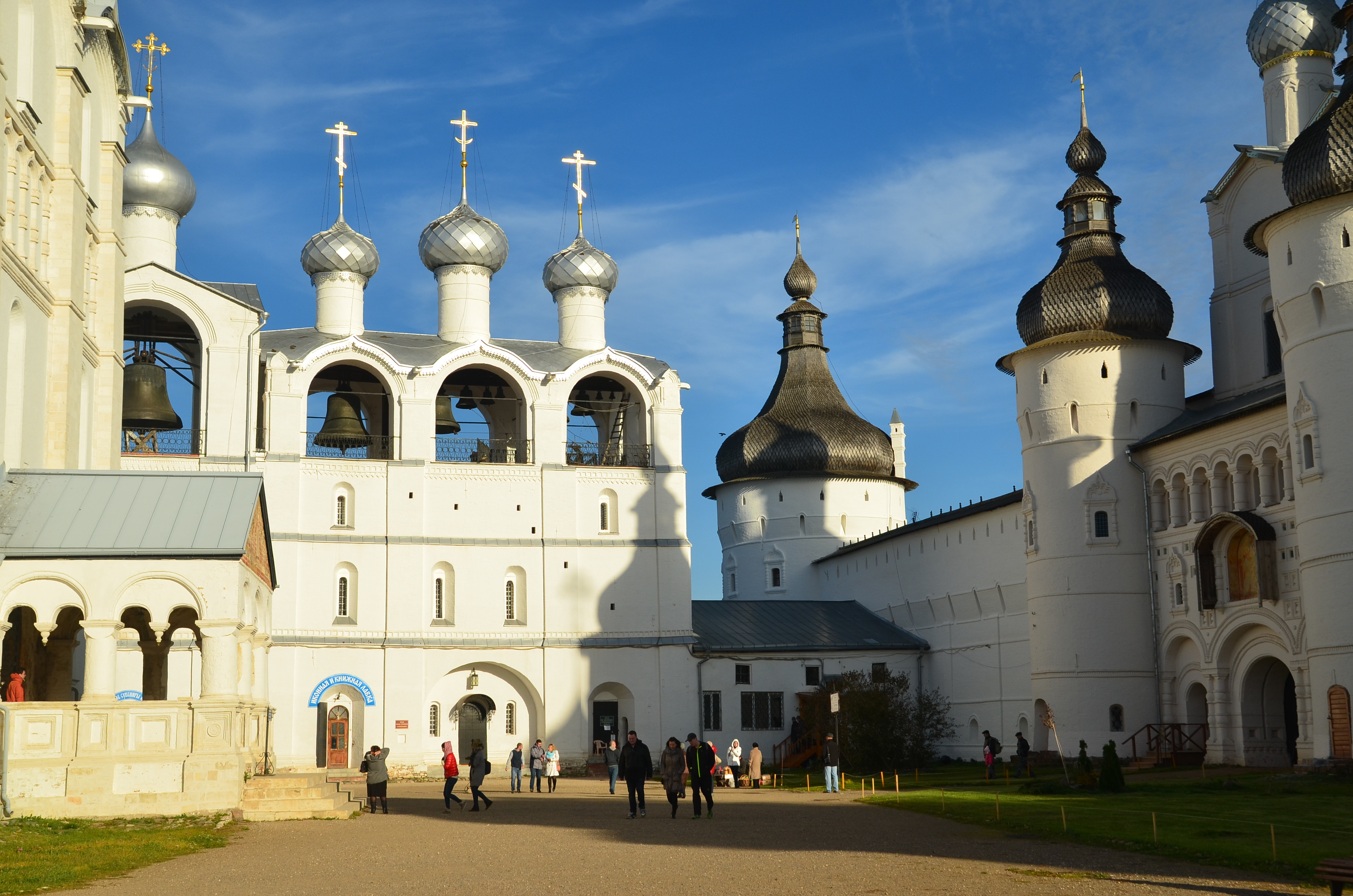 Ансамбль Ростовского Кремля: центр города, Ростов, Ярославская область